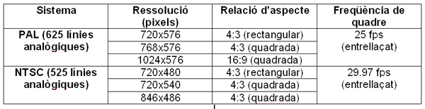 Taula que mostra les diferents definicions espacials.